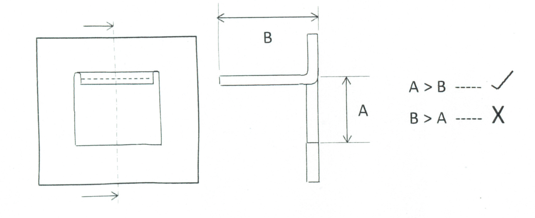 BRACKETகள் வடிவமைப்பு